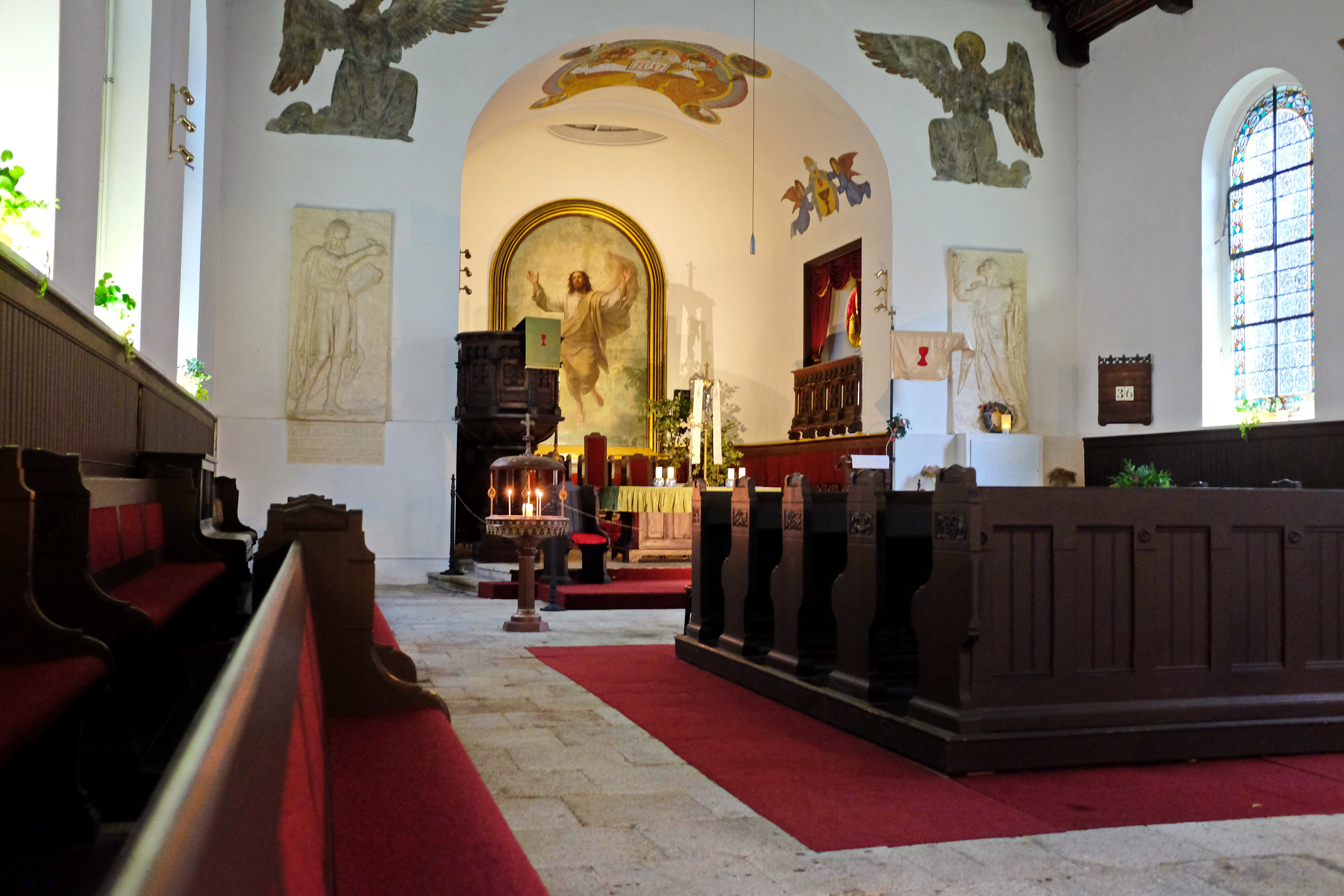 Kostel svatých Petra a Pavla a fara, Mariánskolázeňská čp. 3, 675/4, Karlovy Vary.